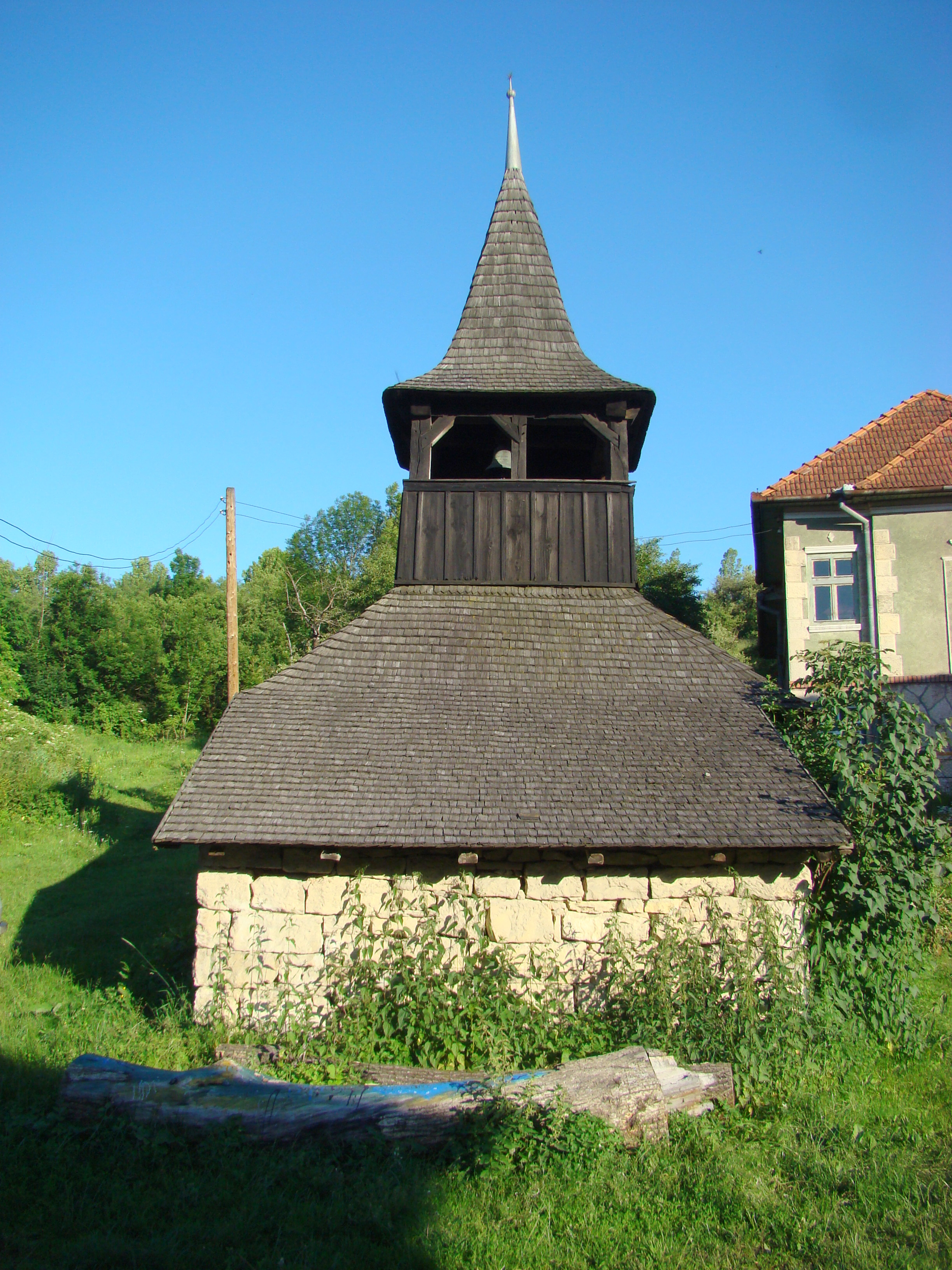 Clopotniţa bisericii reformate, sat DOROLŢU; comuna AGHIREŞU, Cluj 02